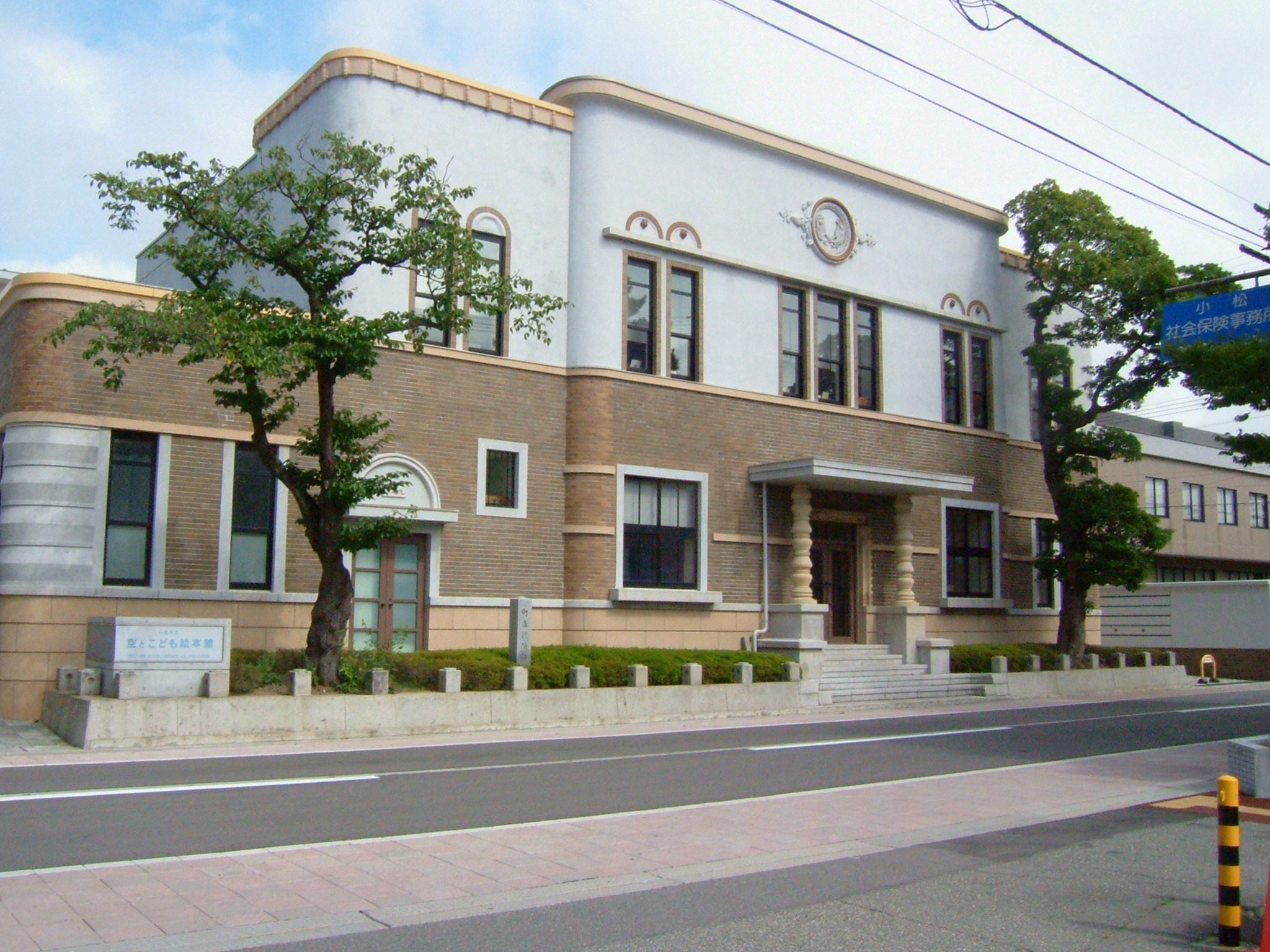 石川県小松市にある小松市立空とこども絵本館。旧小松警察署の庁舎を利用している。